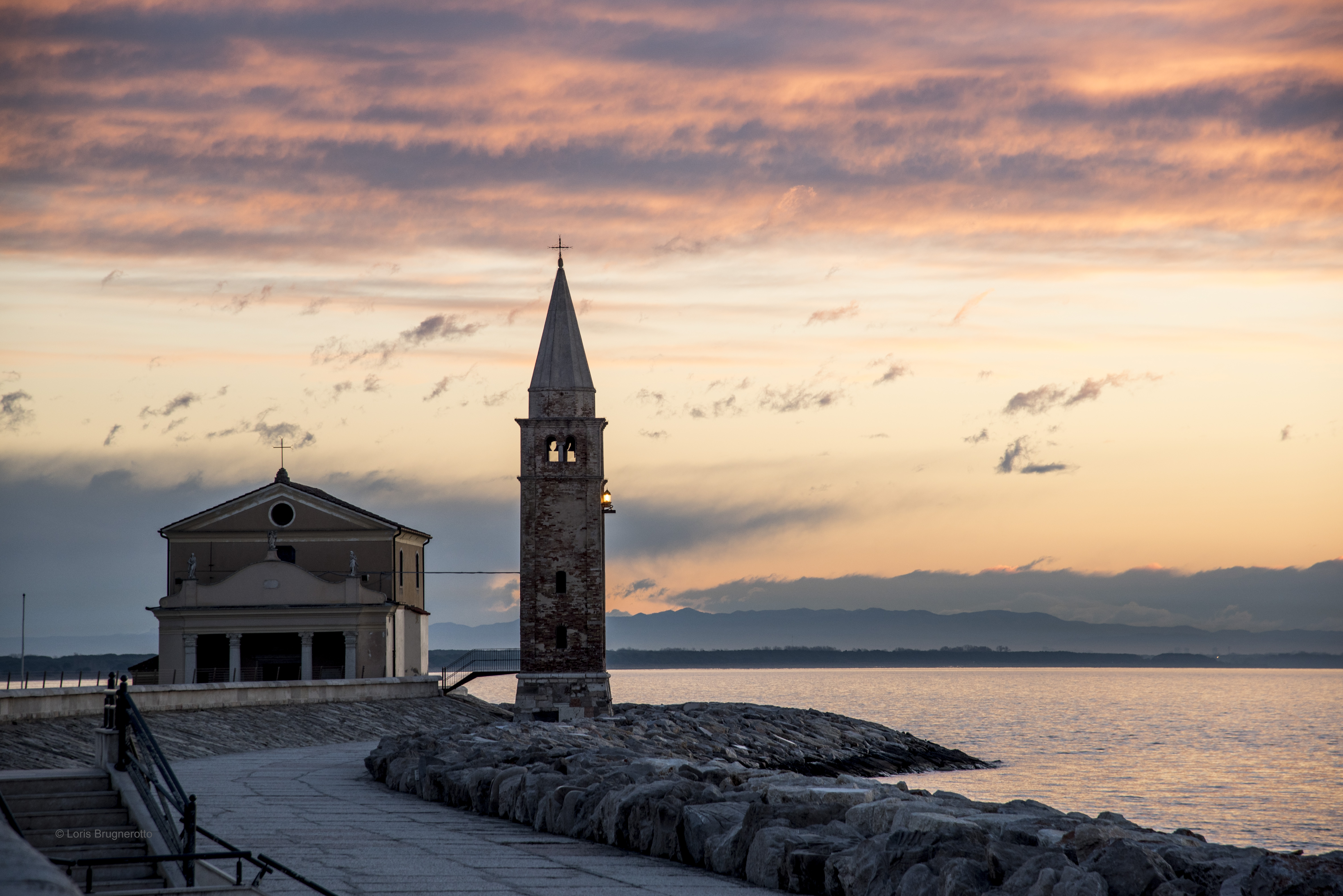 Alba di Marzo 2017 presso la scogliera This is a photo of a monument which is part of cultural heritage of Italy.